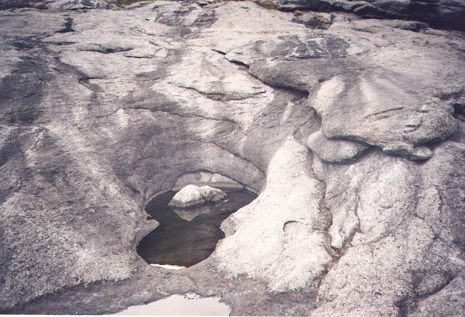 Gletschertopf in der Nähe von Nesland auf den Lofoten